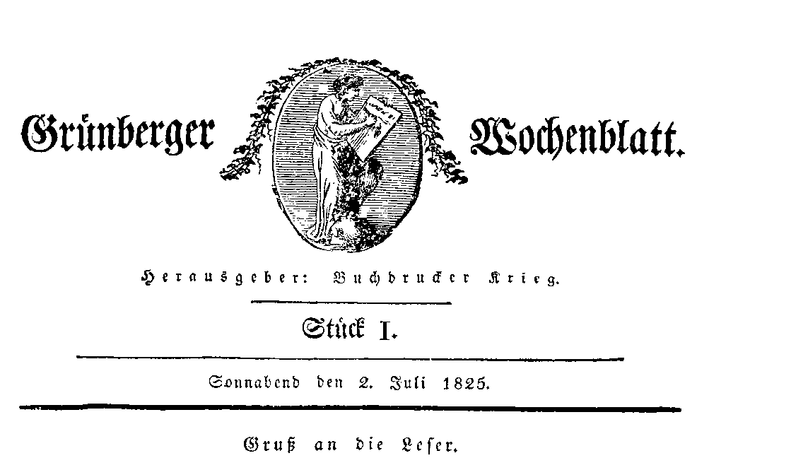 Winieta "Grünberger Wochenblatt" z 2 lipca 1825, pod winietą tytuł wstępniaka "Gruß an die Leser"